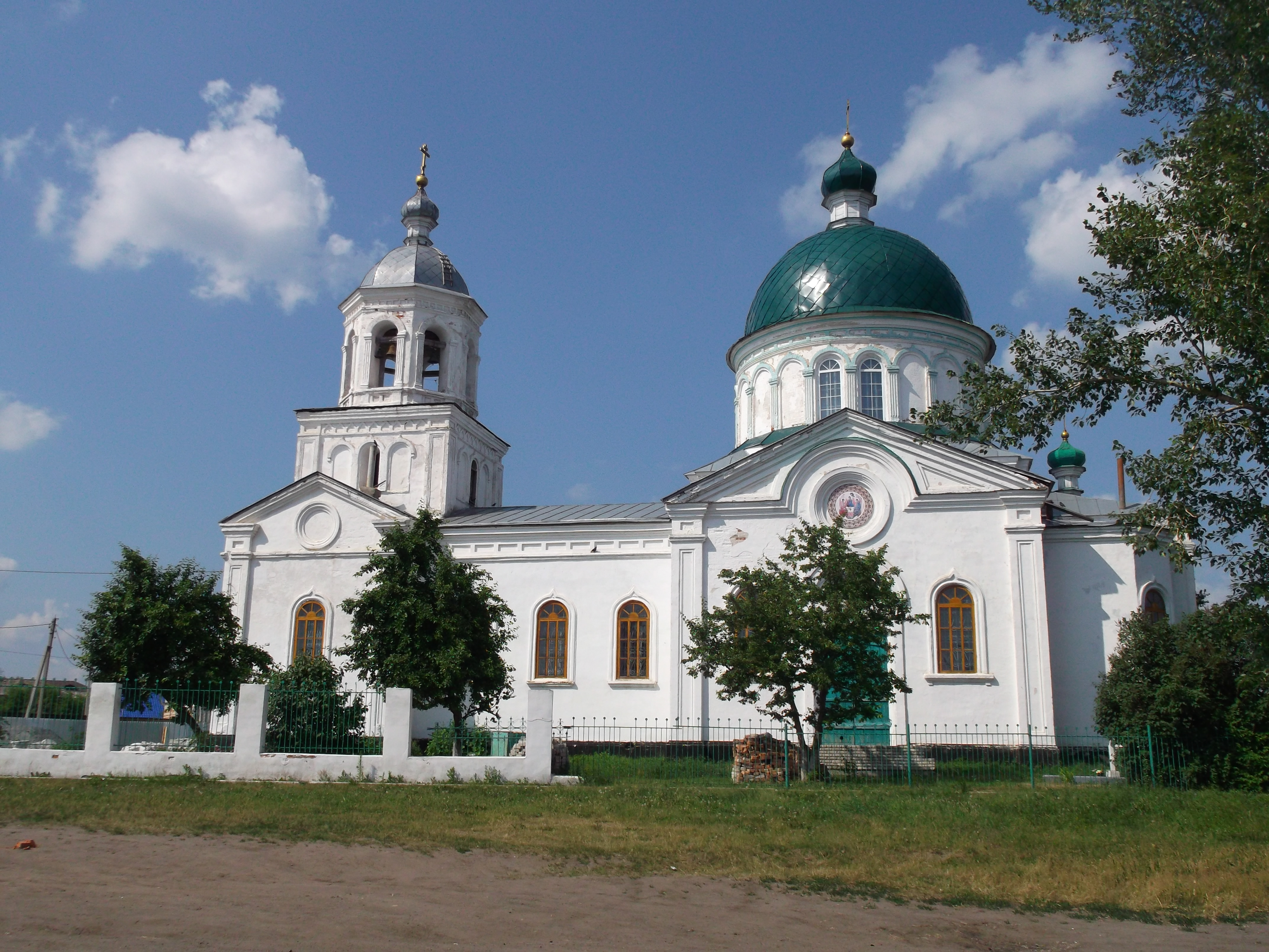 пос. Мишкино